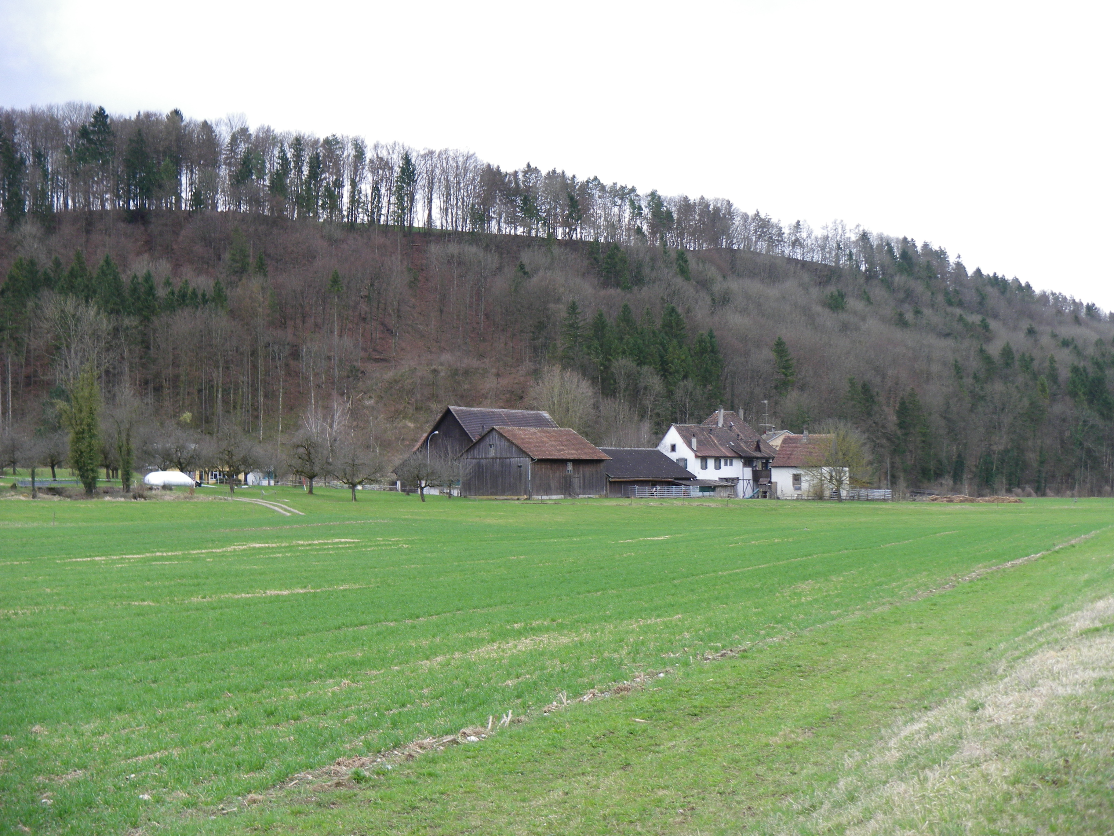 Der Weiler Wunderklingen bei Hallau im Kanton Schaffhausen aus Nordöstlicher Richtung gesehen.